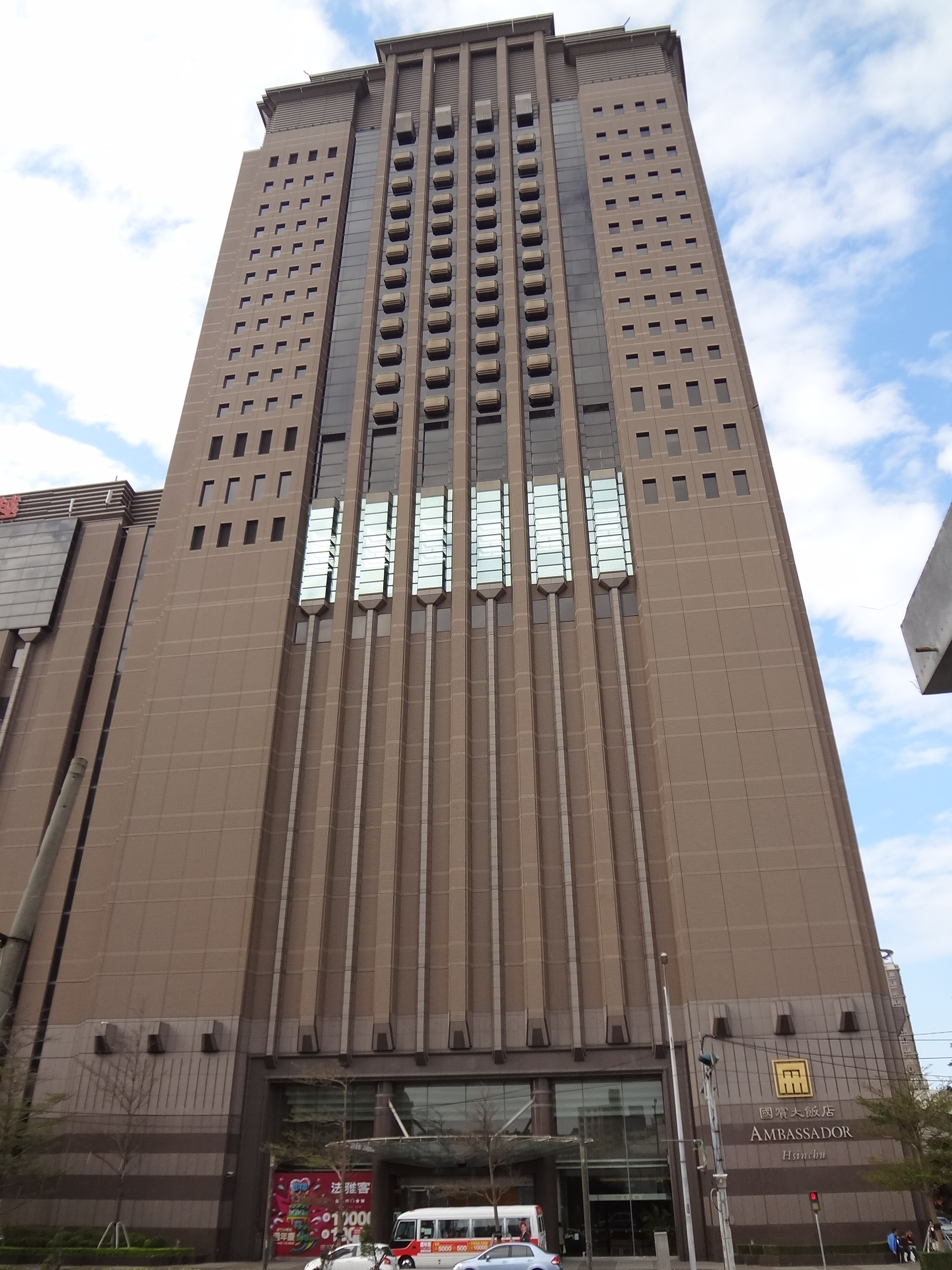 新竹國賓大飯店正面外觀。